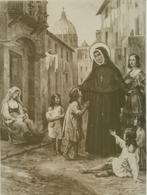 Магдалена София Бара